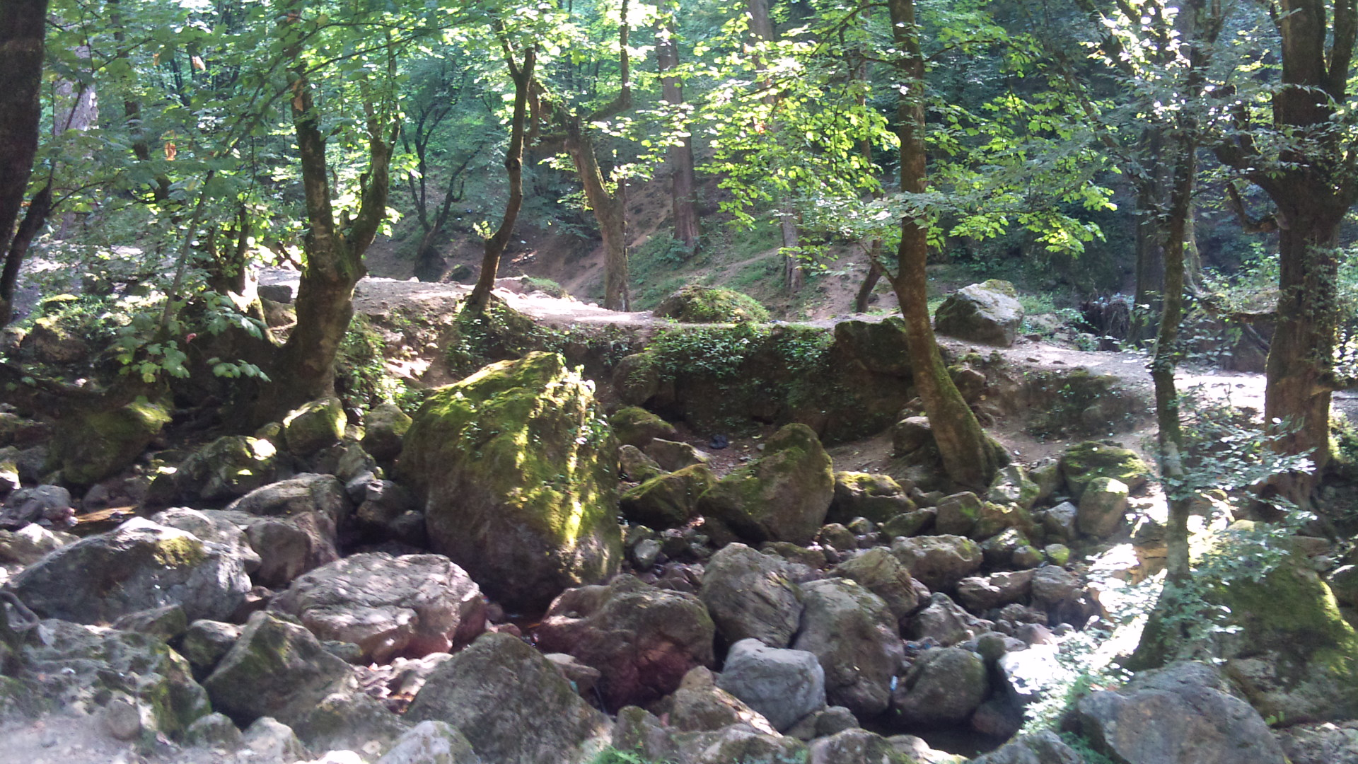 جنگل گیلان